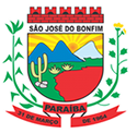 Brasão do município de São José do Bonfim na Paraíba